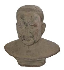 Busto de Pol Pot